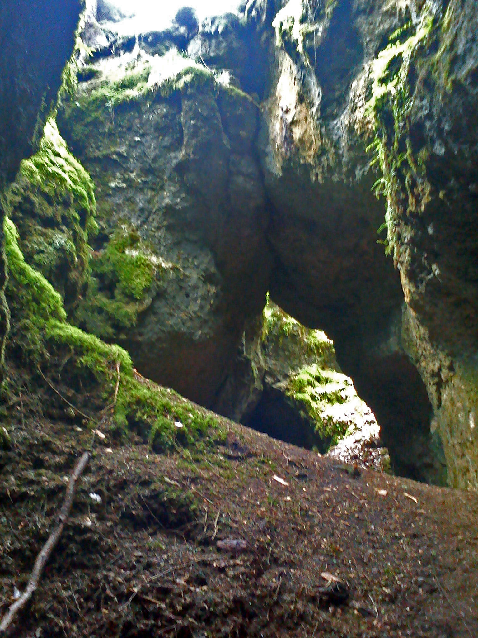 Eislöcher